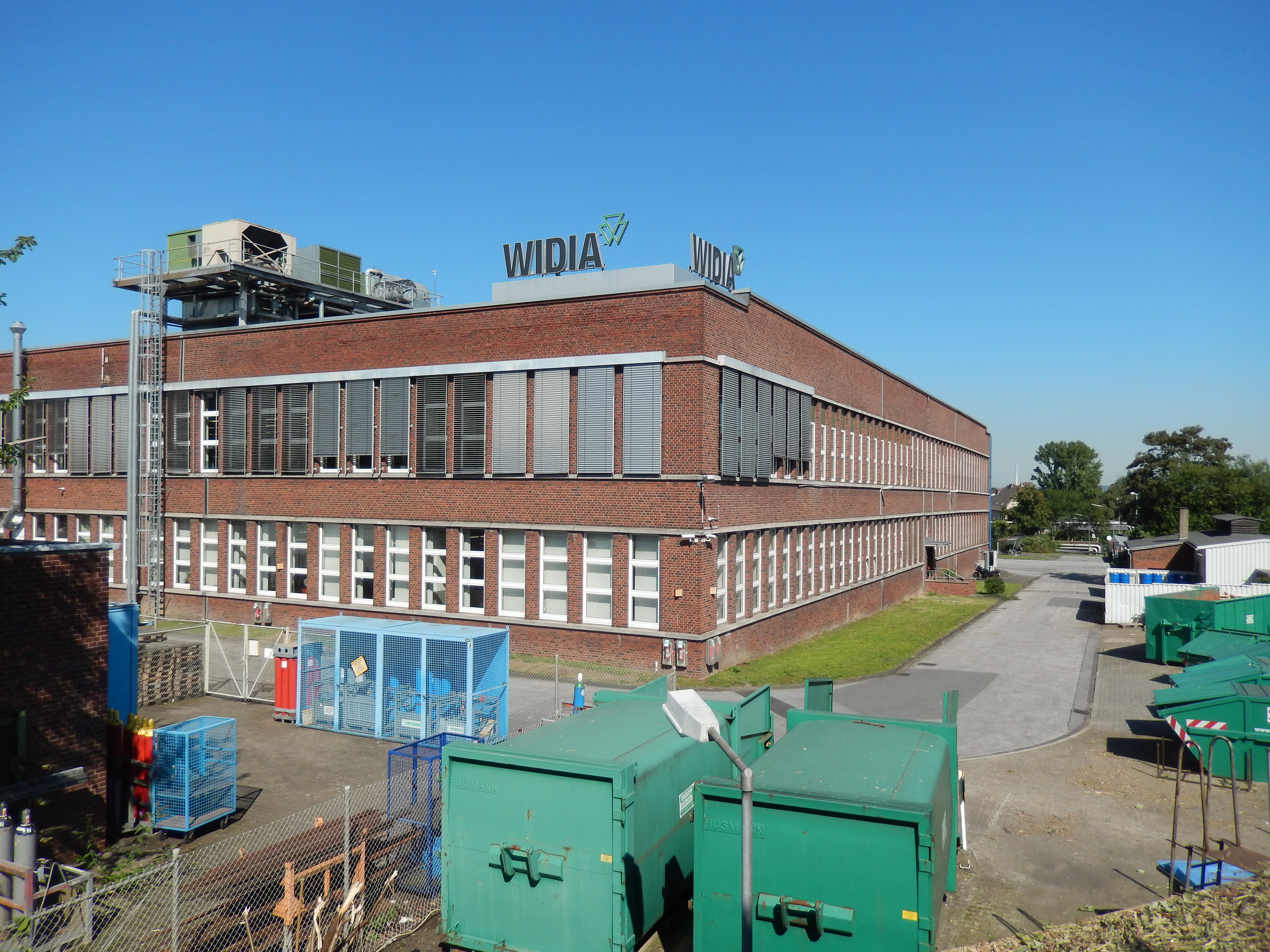 Fabrikgebäude Kennemetal Widia in Essen